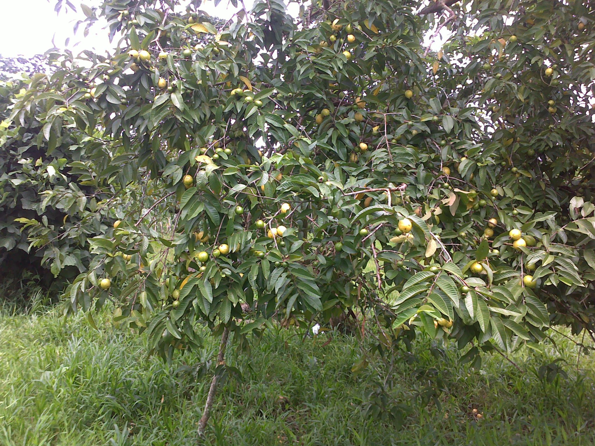 Se observan frutos maduros e inmaduros en el árbol.